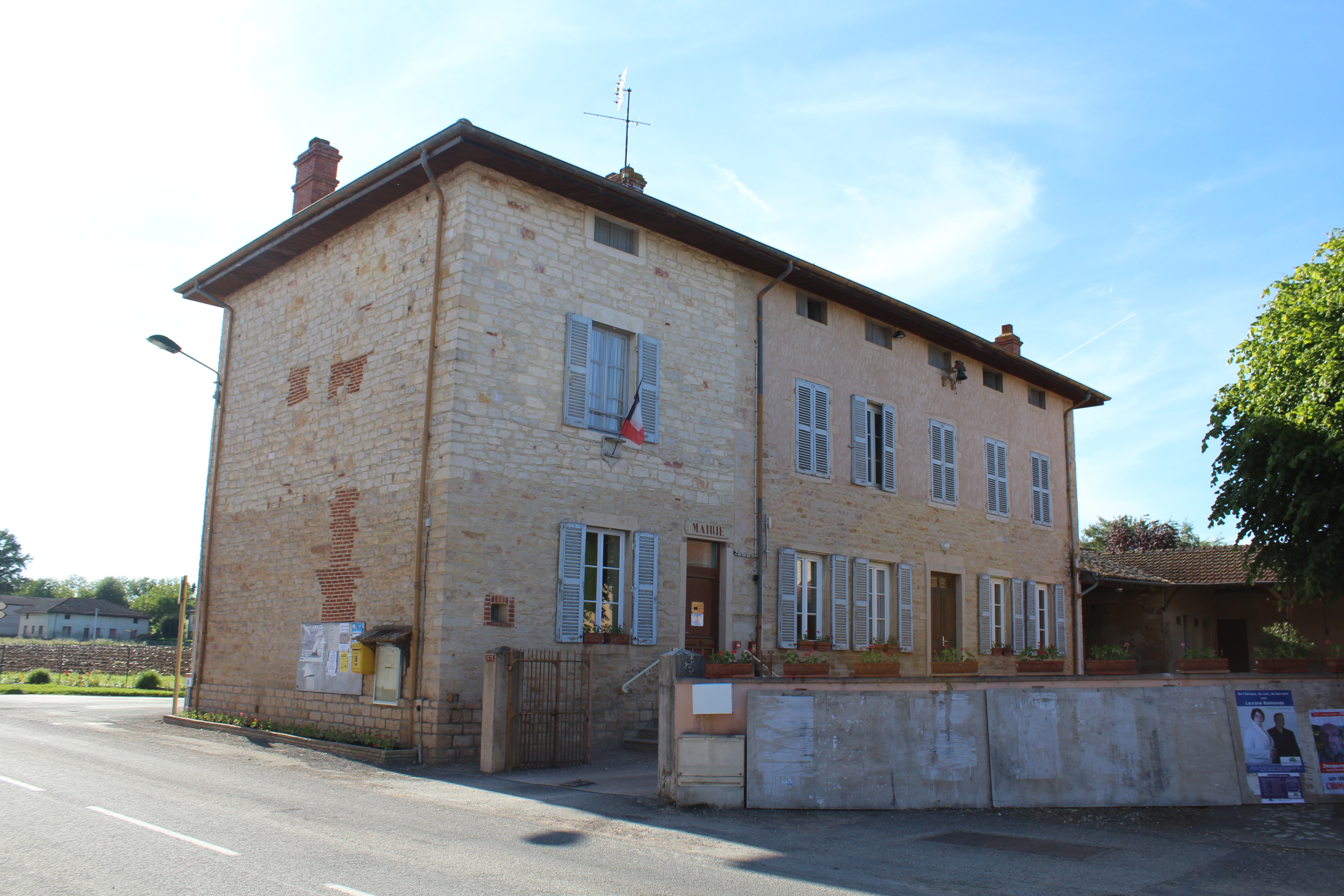 Mairie de Chavannes-sur-Reyssouze.